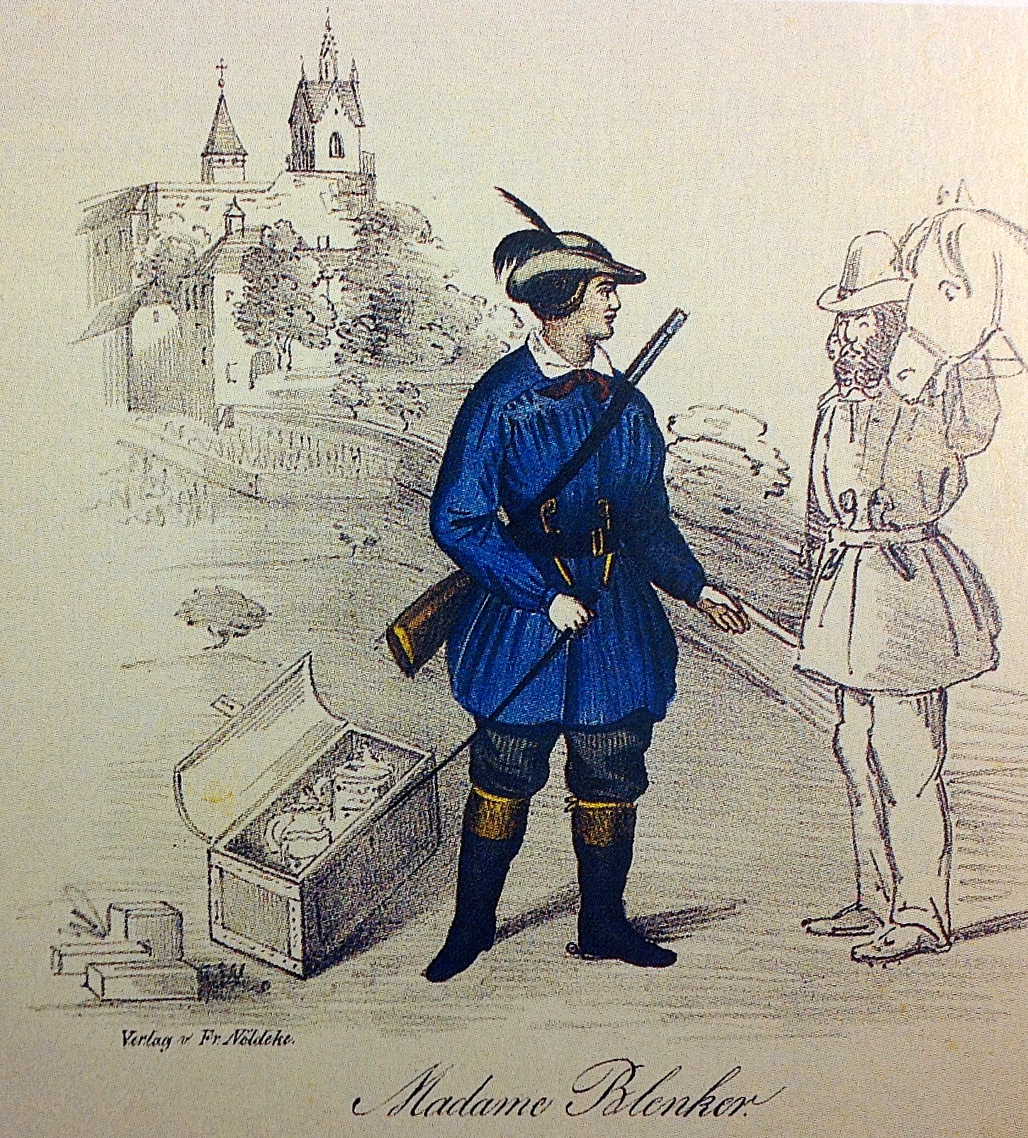 Lithographie, 1849. “Portrait- und Kostümgalierie aus der badisch-pfälzischen Revolution 1849”. “Elise Blenker mit einer gefüllten Truhe vor Schloß Eberstein.” Geboren als Elise Aun in Kothen, verheiratet mit Ludwig Blenker.